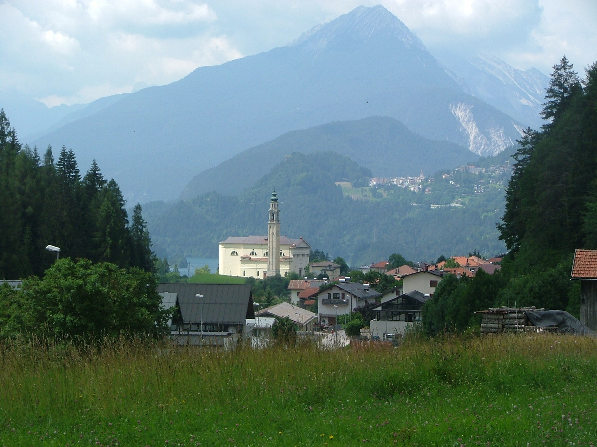 Panorama of Domegge di Cadore, Province of Belluno,Dolomites Veneto, Italy